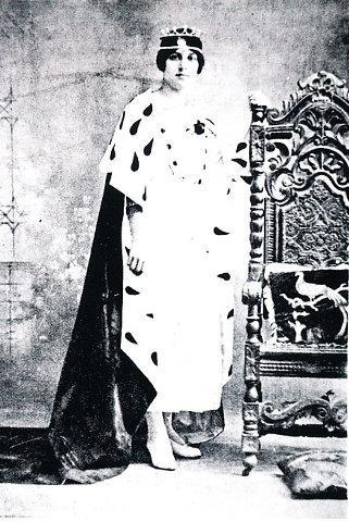 En 1918 se eligió por primera vez una reina para presidir las festividades del Carnaval. Fue elegida Alicia Lafaurie Roncallo.